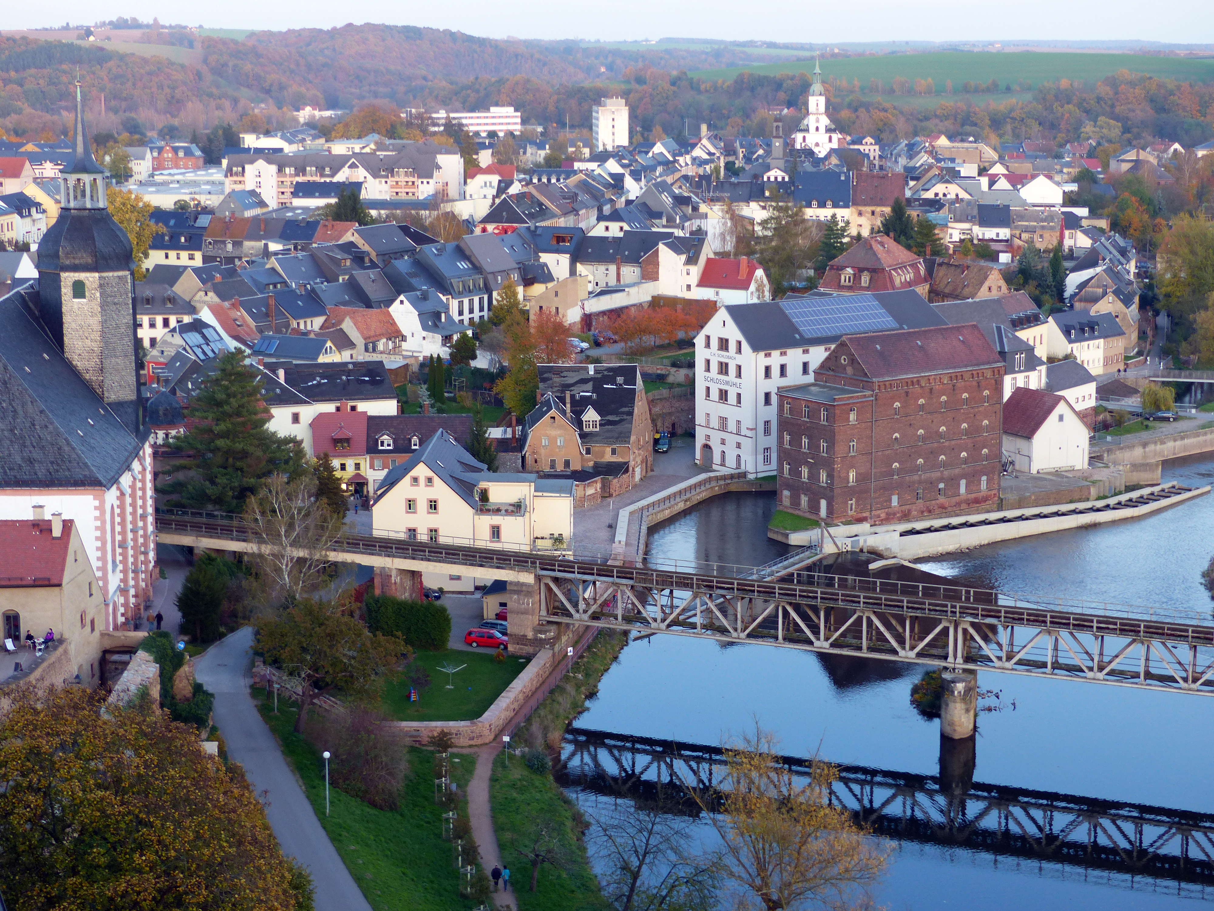 Altstadt von Rochlitz - Blick vom Schloss